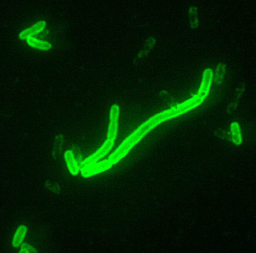 Yersinia pestis im Fluoreszenz-Mikroskop mit Fluoreszenz-markiertem Antikörper gegen ein Kapsel-Antigen